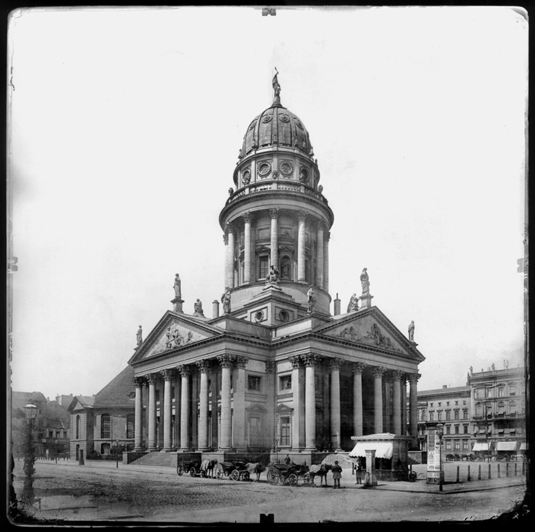 Der Französische Dom in Berlin, eines von Albrecht Meydenbauers Versuchsbildern aus dem Jahre 1882 (40 x 40 cm). 100 Jahre später, zwischen 1977 und 1982, wurde das Bild für die Rekonstruktion der im II. Weltkrieg schwer beschädigten Kirche benutzt.